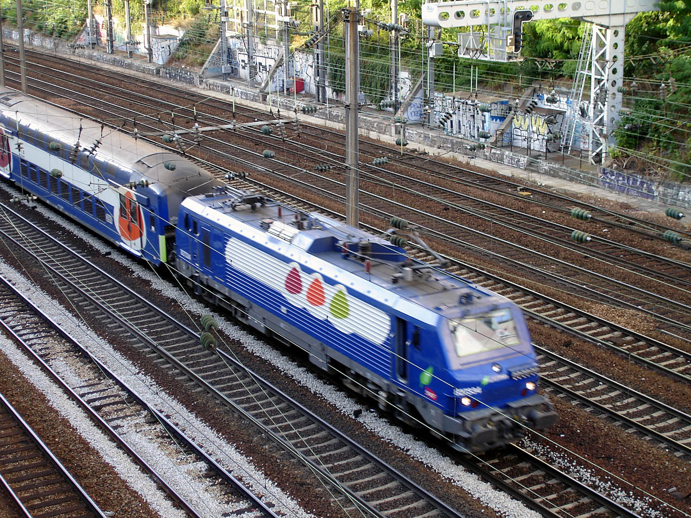 BB 27300 tractant une rame VB 2N dans la tranchée des Batignolles, à proximité de la gare de Pont-Cardinet, Paris, France.